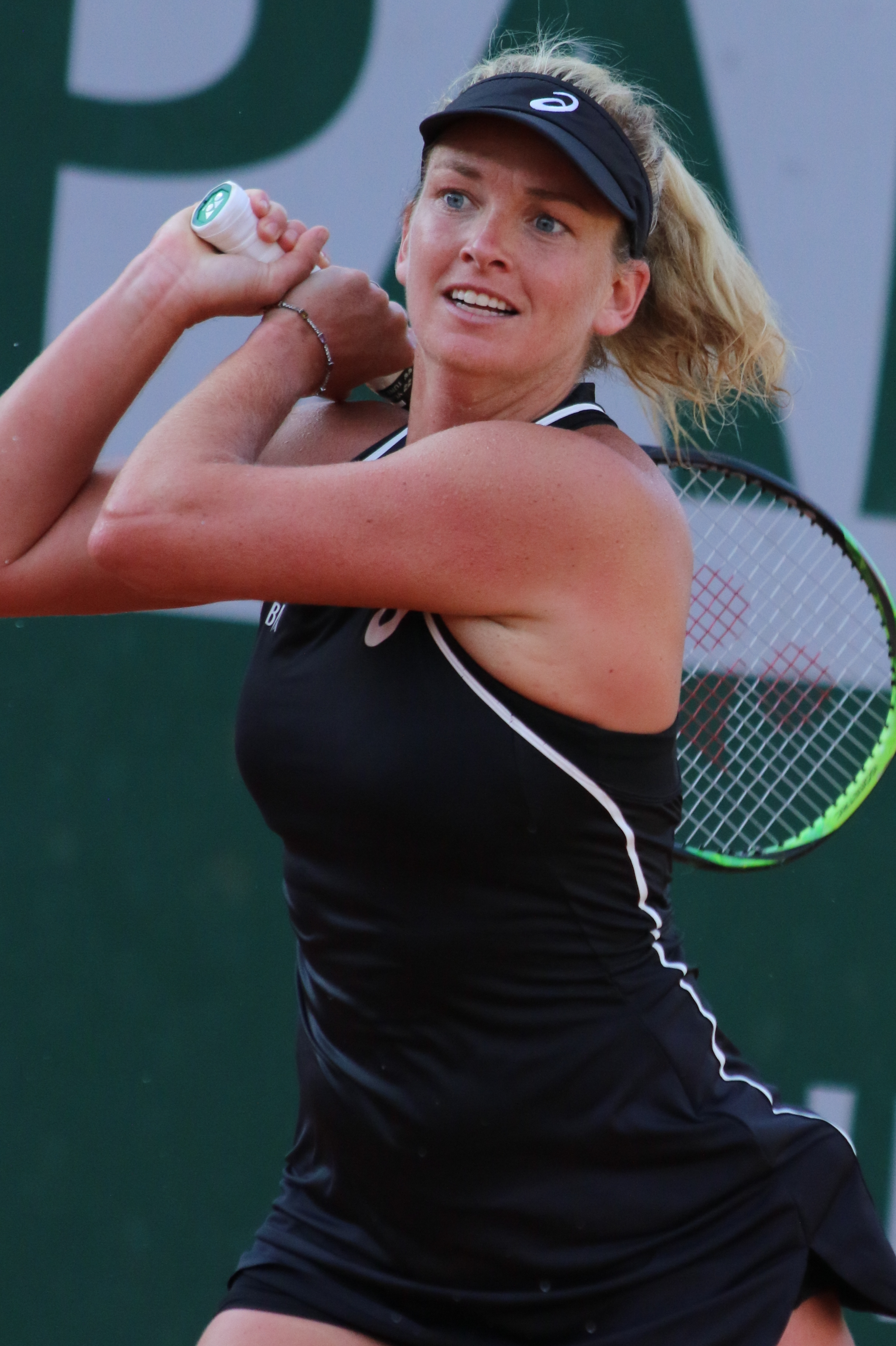 Vandeweghe RG18 (20)